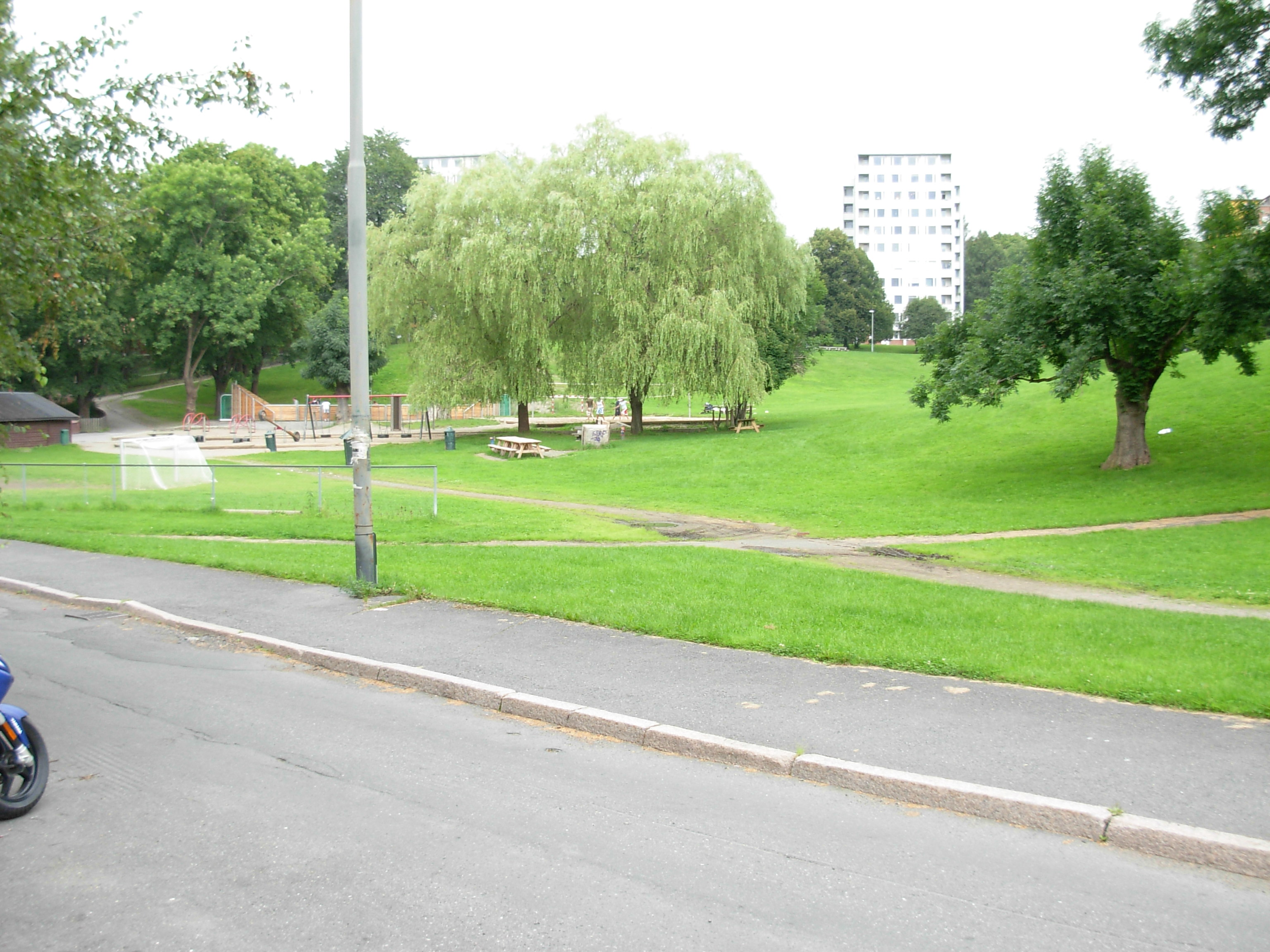 Marienlystparken nord, Oslo